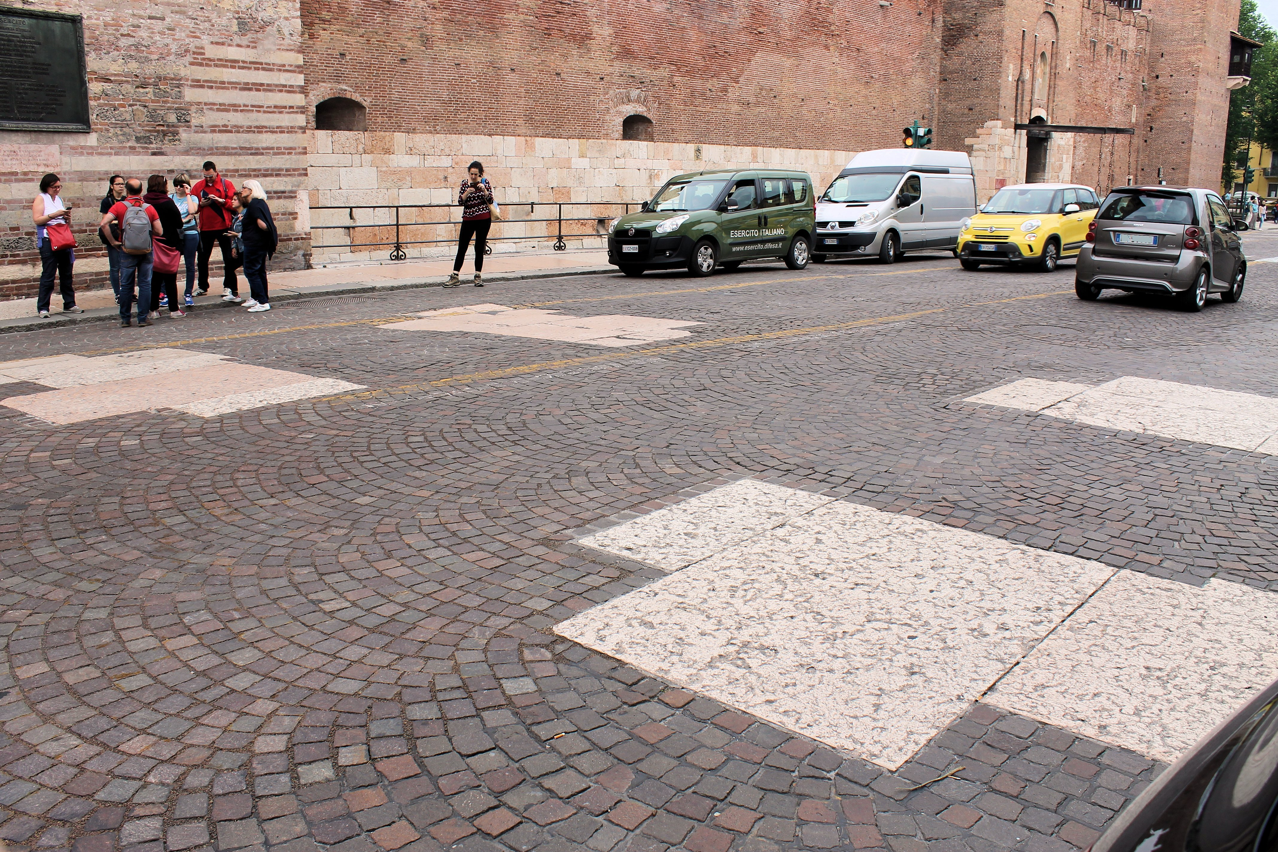 Posizione originaria dell'arco dei Gavi segnalata sul manto stradale